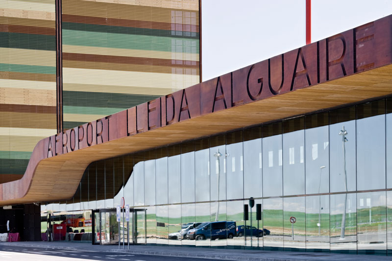 Facana aeroport Lleida-Alguaire